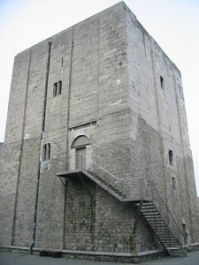 Photo personnelle